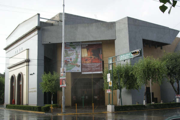 Sala Felipe Villanueva, Ubicada sobre la calle José María Morelos y Pavón en Toluca.